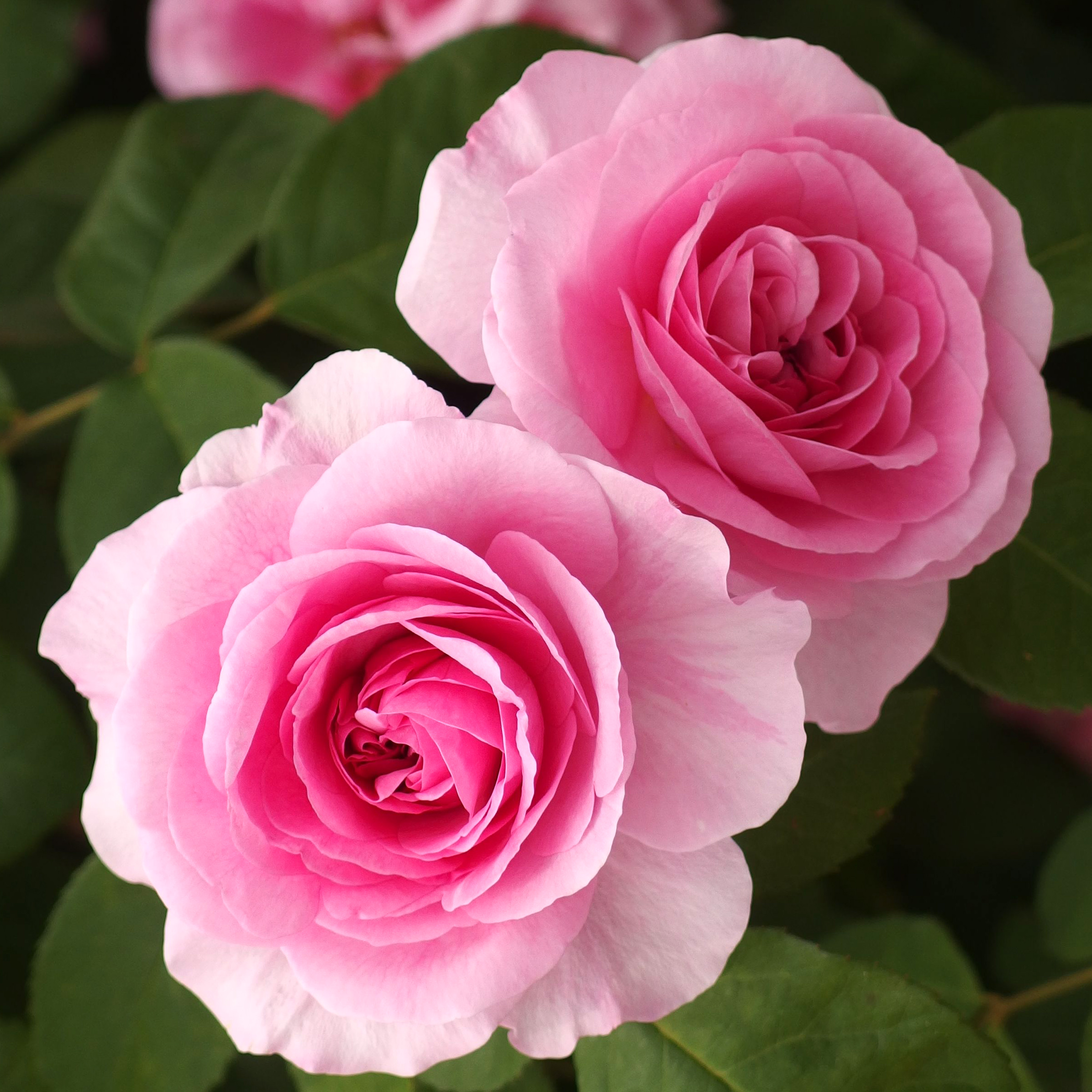 Rose, Gertrude Jekyll, バラ, ガートリュード ジェキル, English Rose イングリッシュローズ United Kingdom イギリス Austin 1986